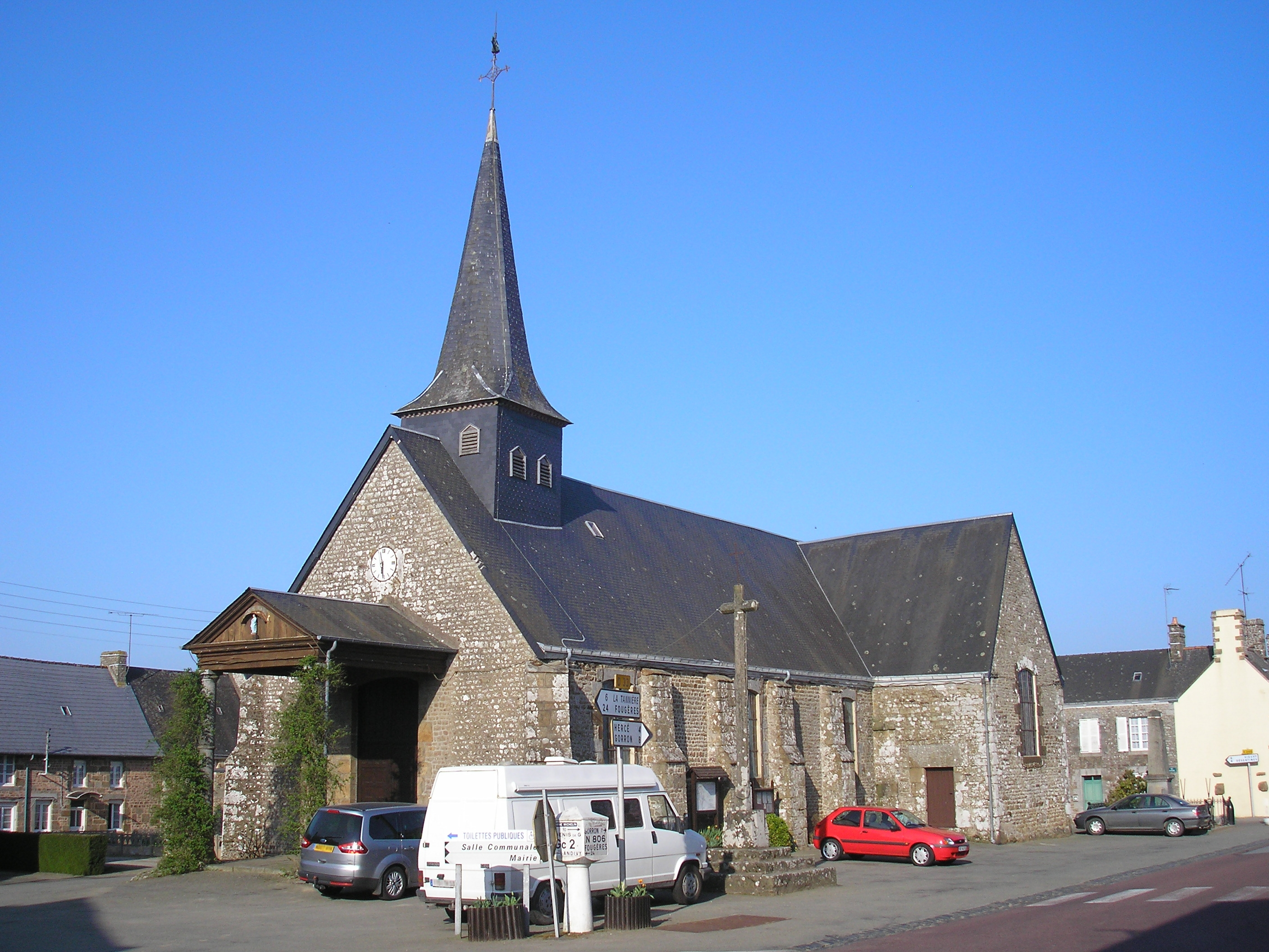 Levaré (Pays de la Loire, France). L'église Saint-Victeur.